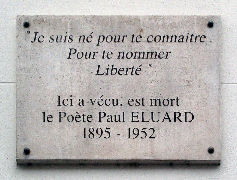 Plaque à l'angle d'un immeuble de Charenton commémorant Paul Éluard.